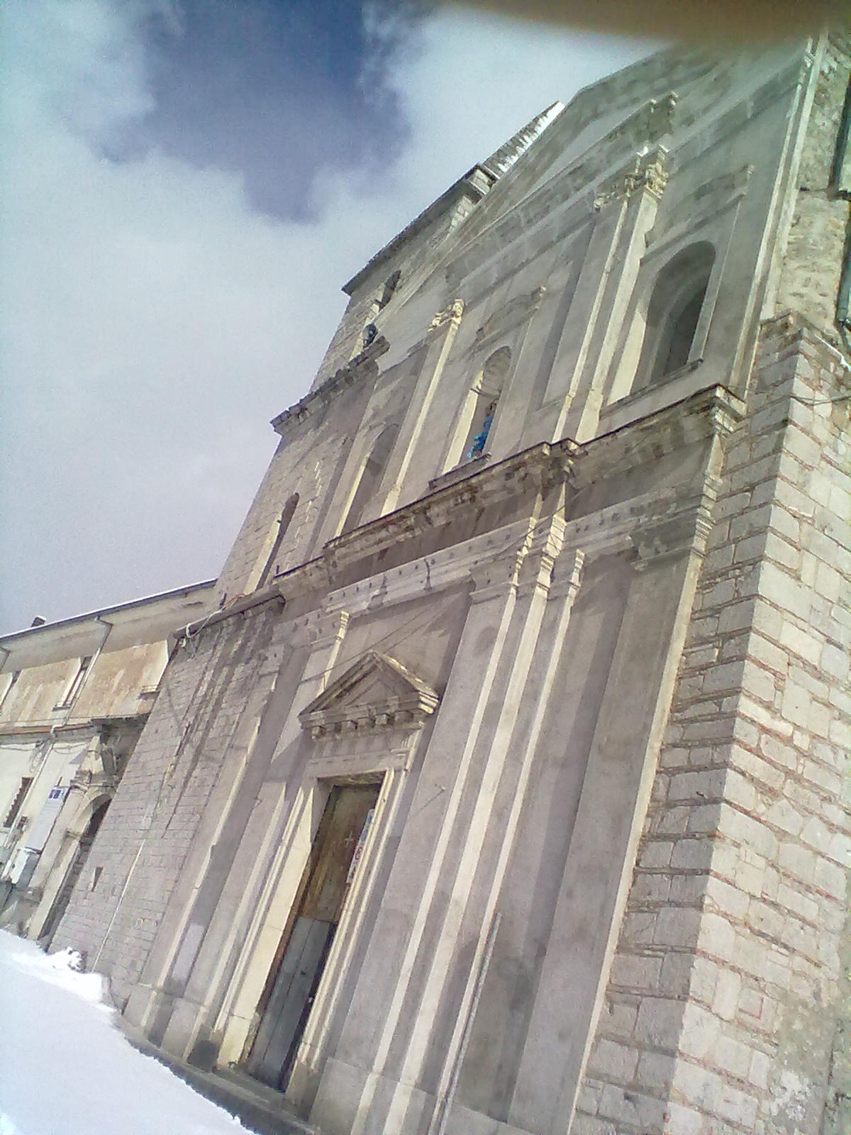 sagrestia